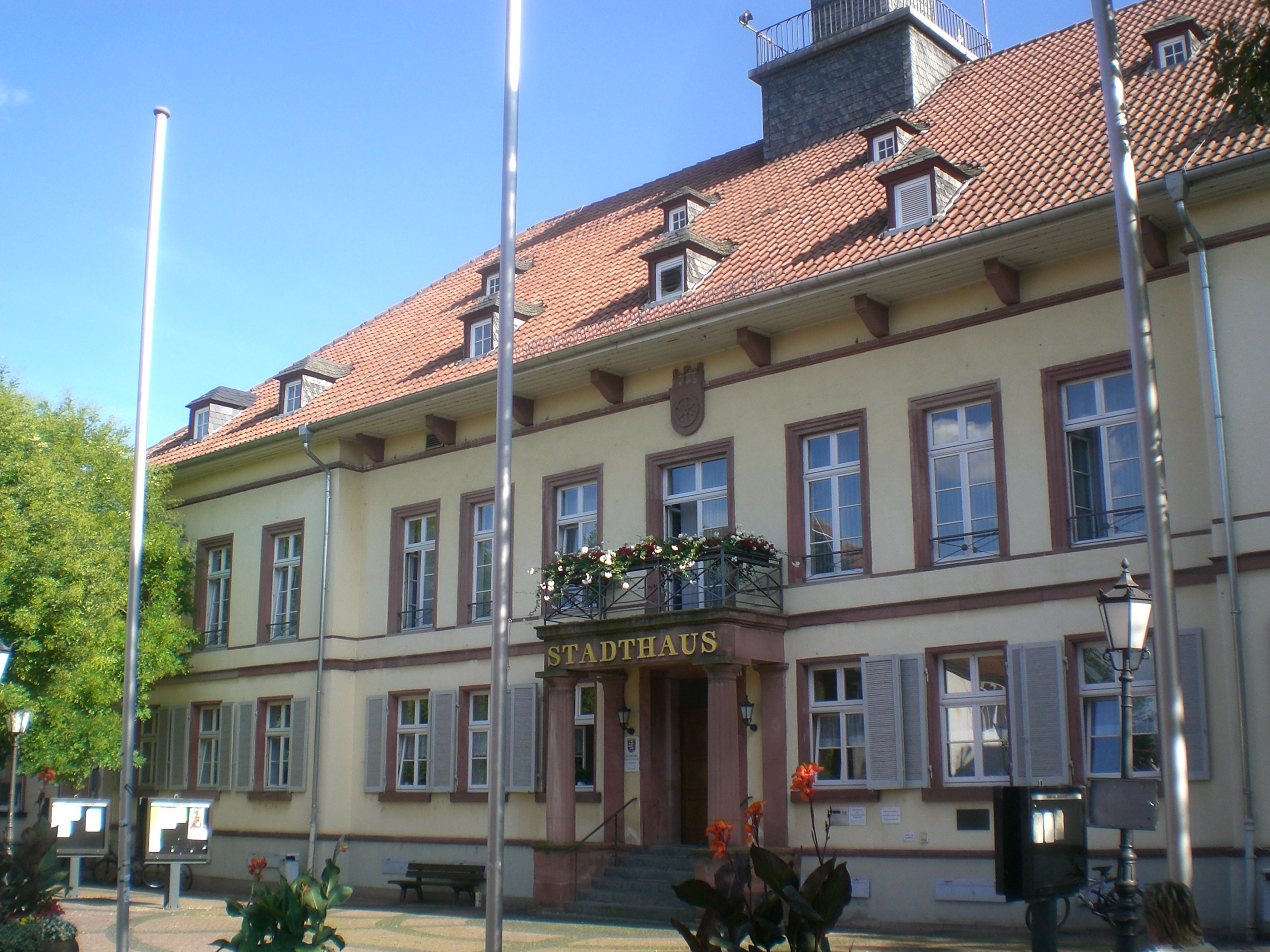 urbodomo en Gernsheim, Hesio